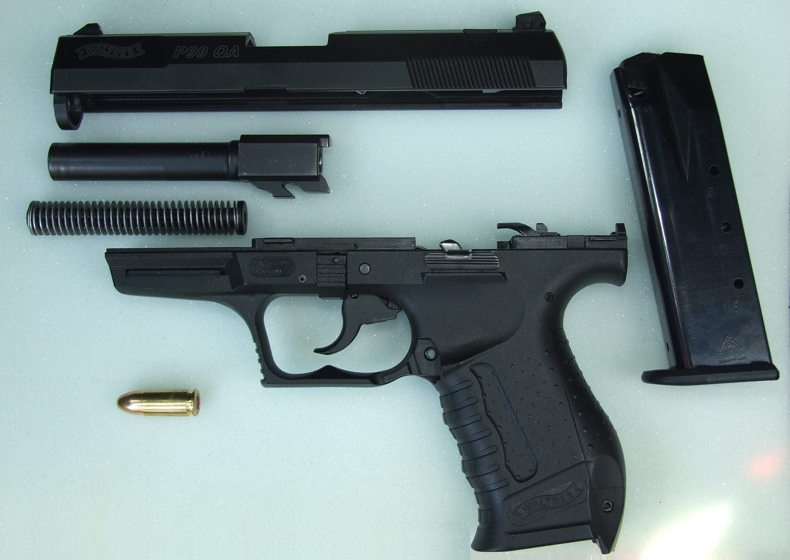 Walther P99 (QA trigger) caliber 9 mm Luger, stripped